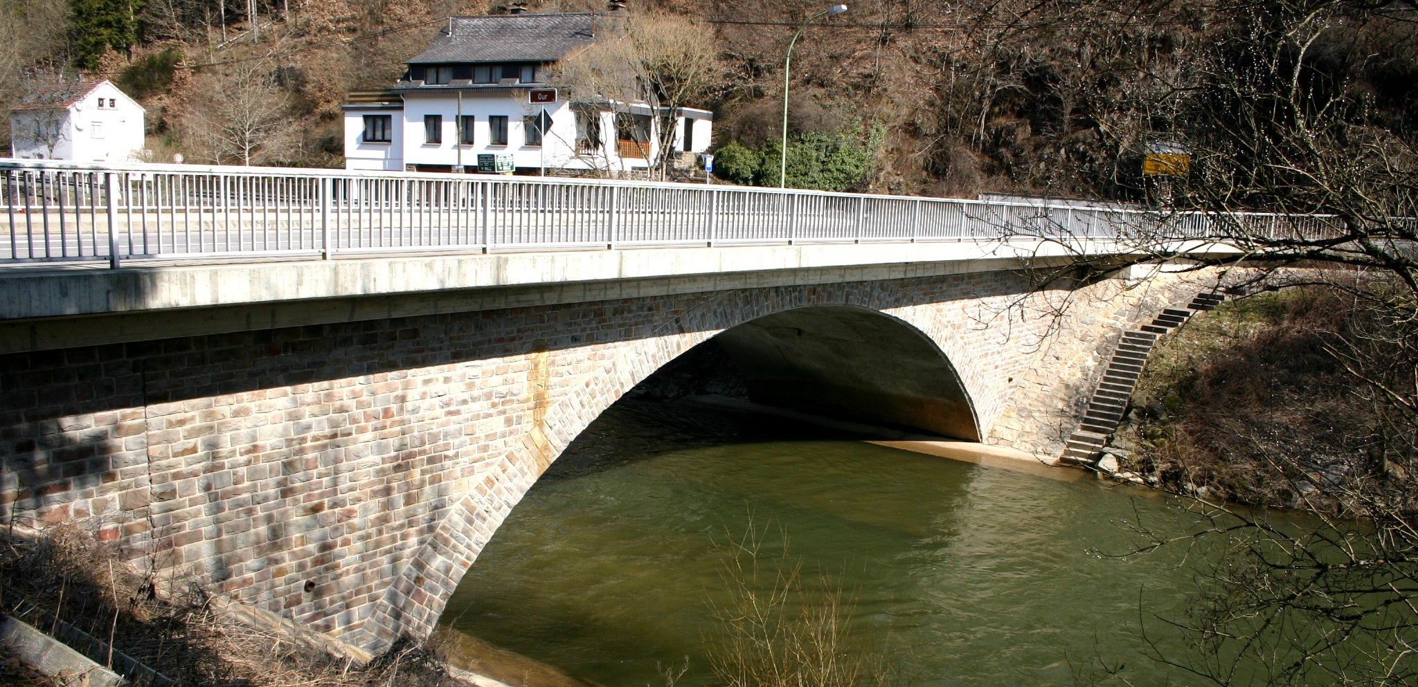 Doosberbréck.